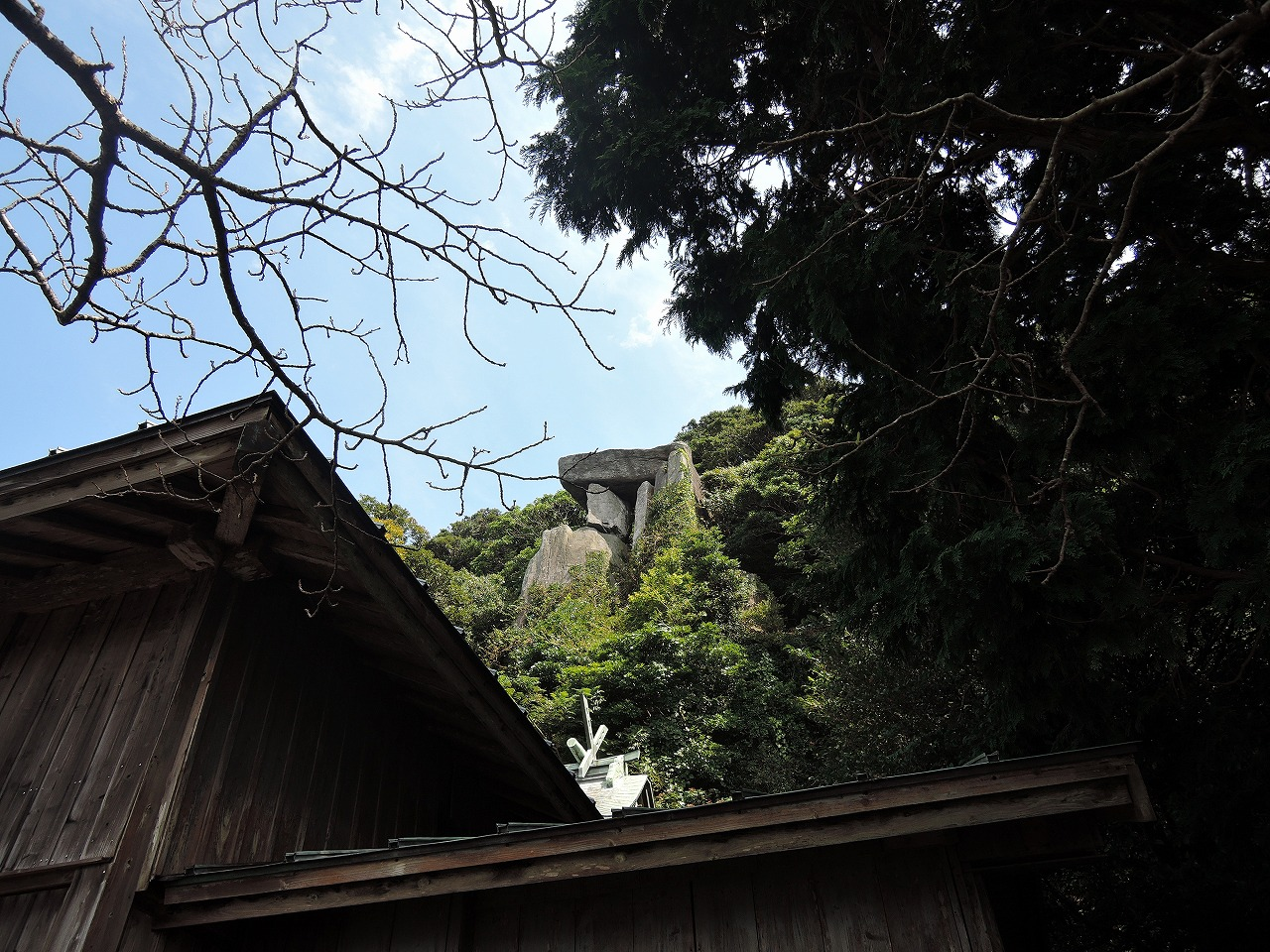 沖ノ神島神社社殿と王位石